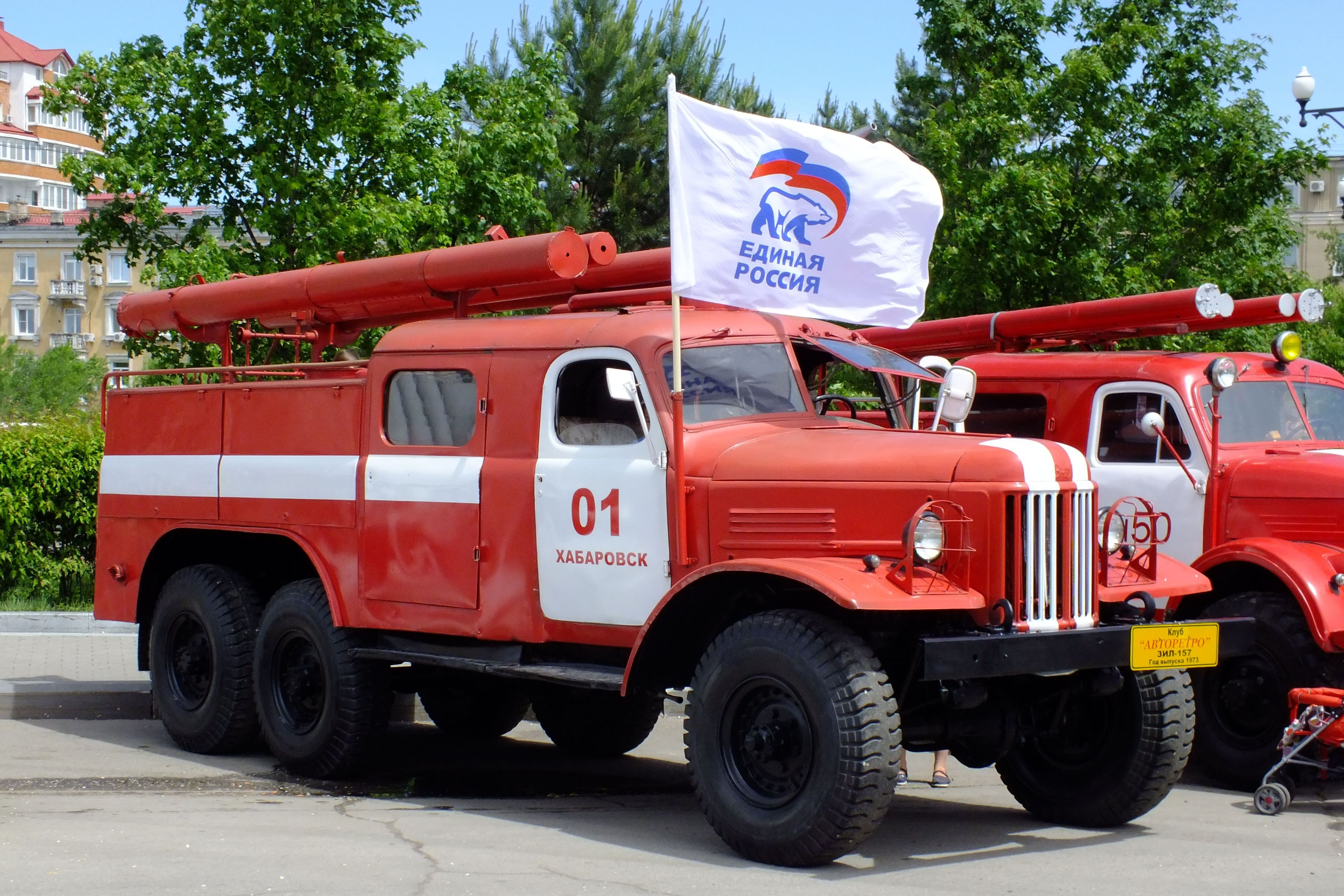 ZiL-157